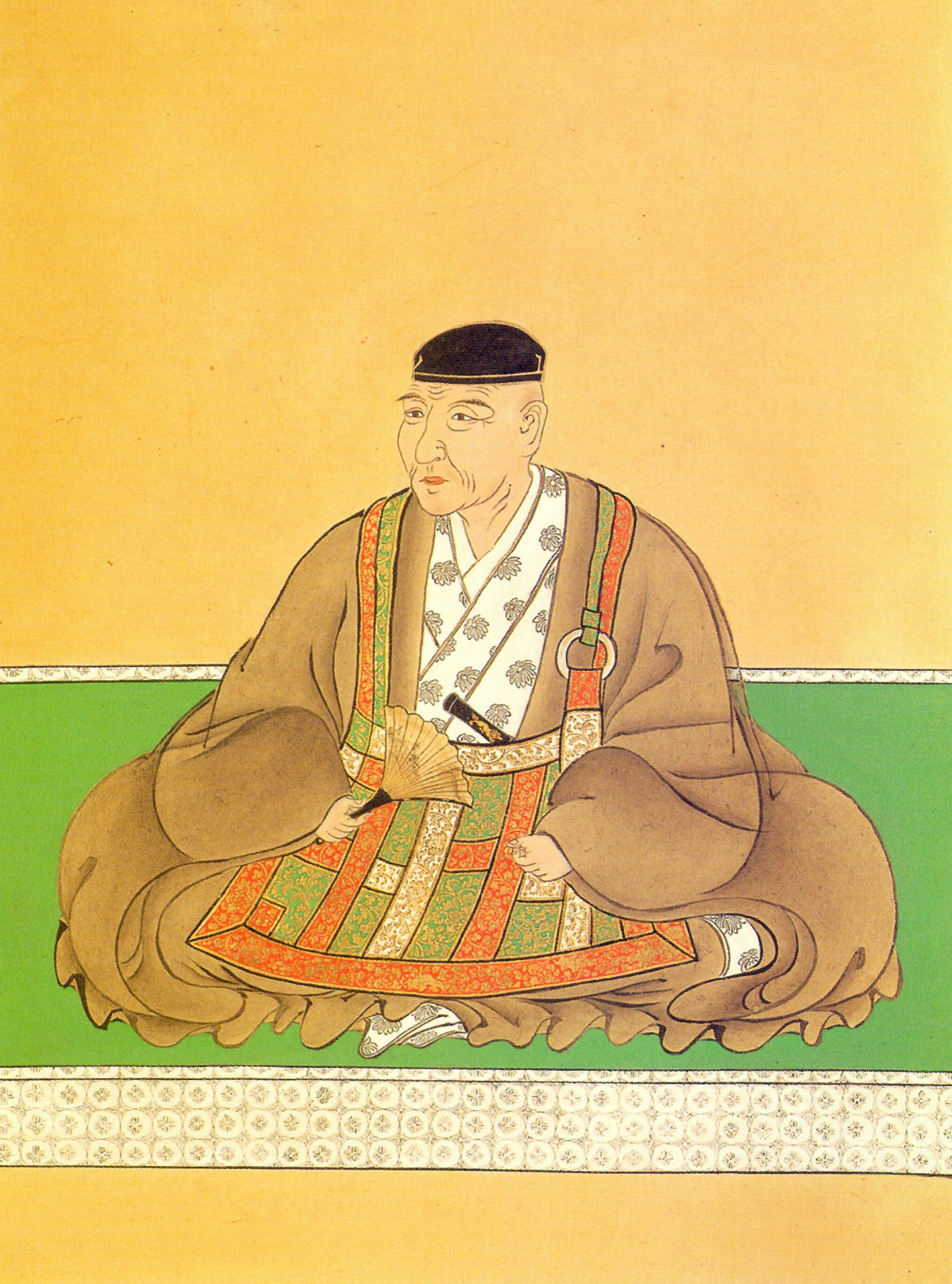 織田信包の肖像。